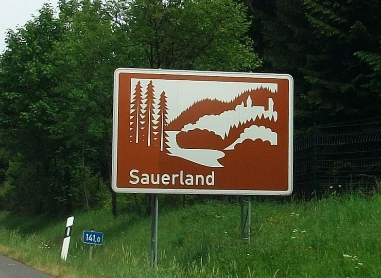 Unterrichtungstafel »Sauerland« an der A4 vor Olpe (Germany)